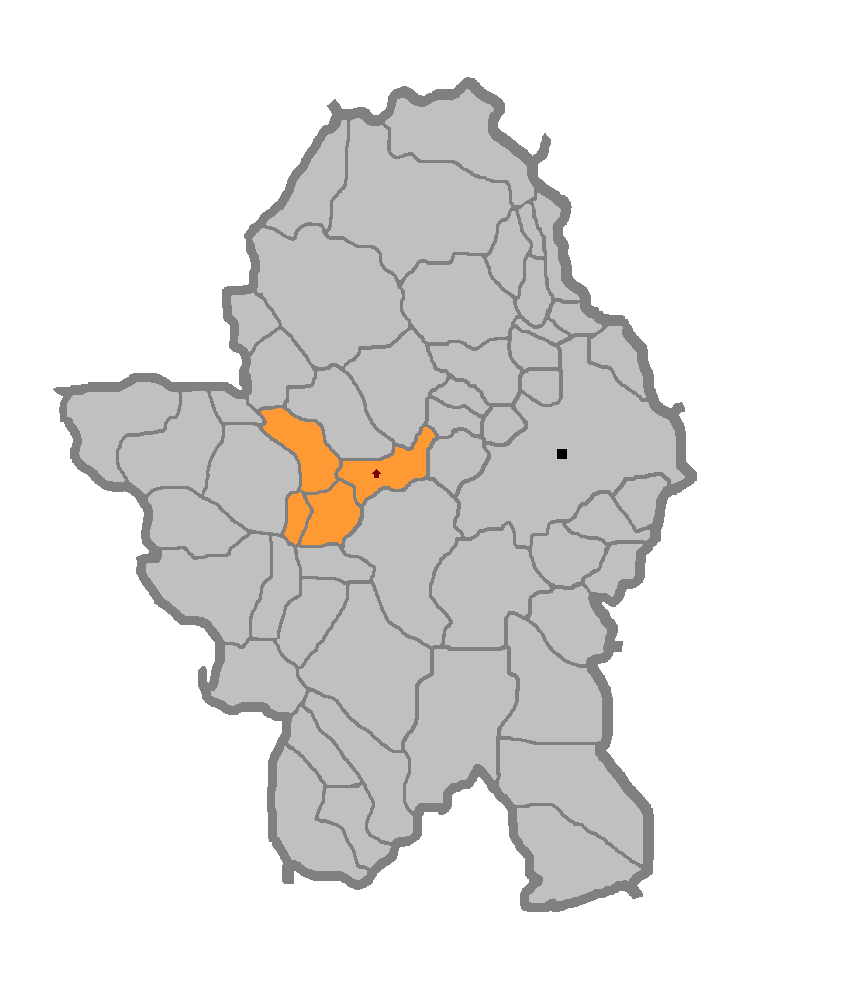 Мјесна заједница Голеши